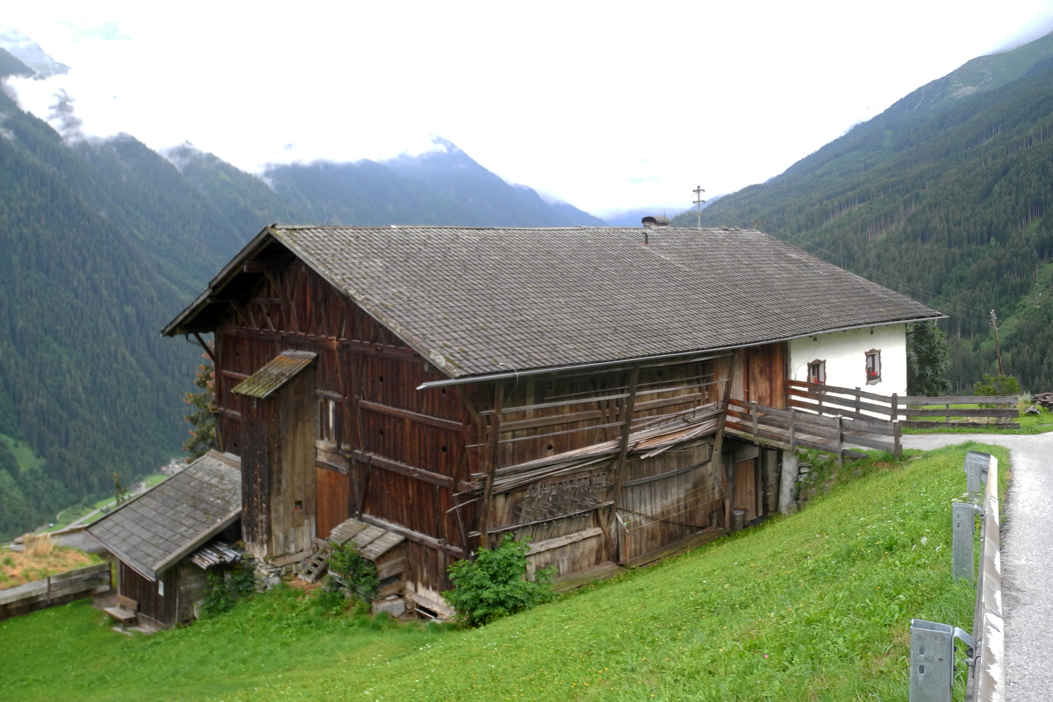 Der Weiler Forchach oberhalb von Milders im Stubaital